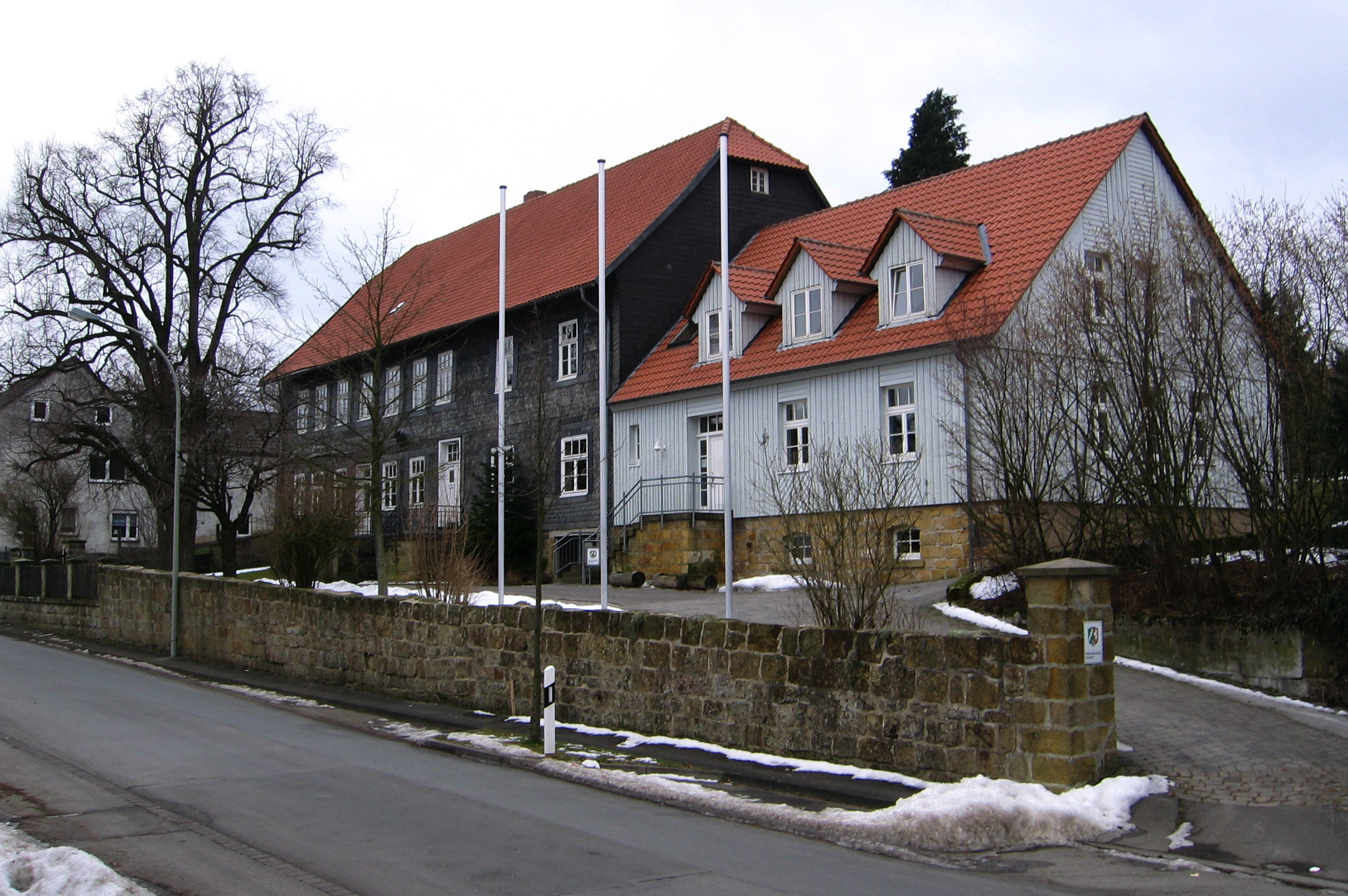 Dienstgebäude des Regionalforstamts Hochstift (ehemals Forstamt Bad Driburg) in Neuenheerse, Bad Driburg, Nordrhein-Westfalen, Deutschland. This is a photograph of an architectural monument. 17